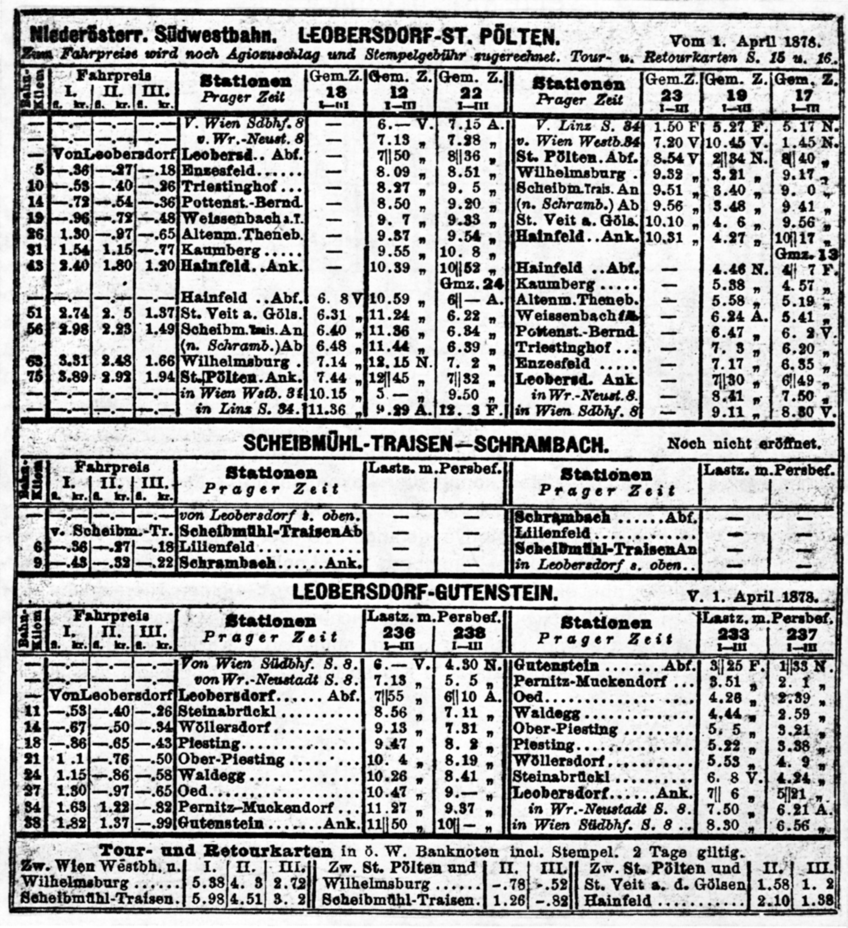 Niederösterreichische Südwestbahnen, Leobersdorfer Bahn, erster-Fahrplan (Auszug)